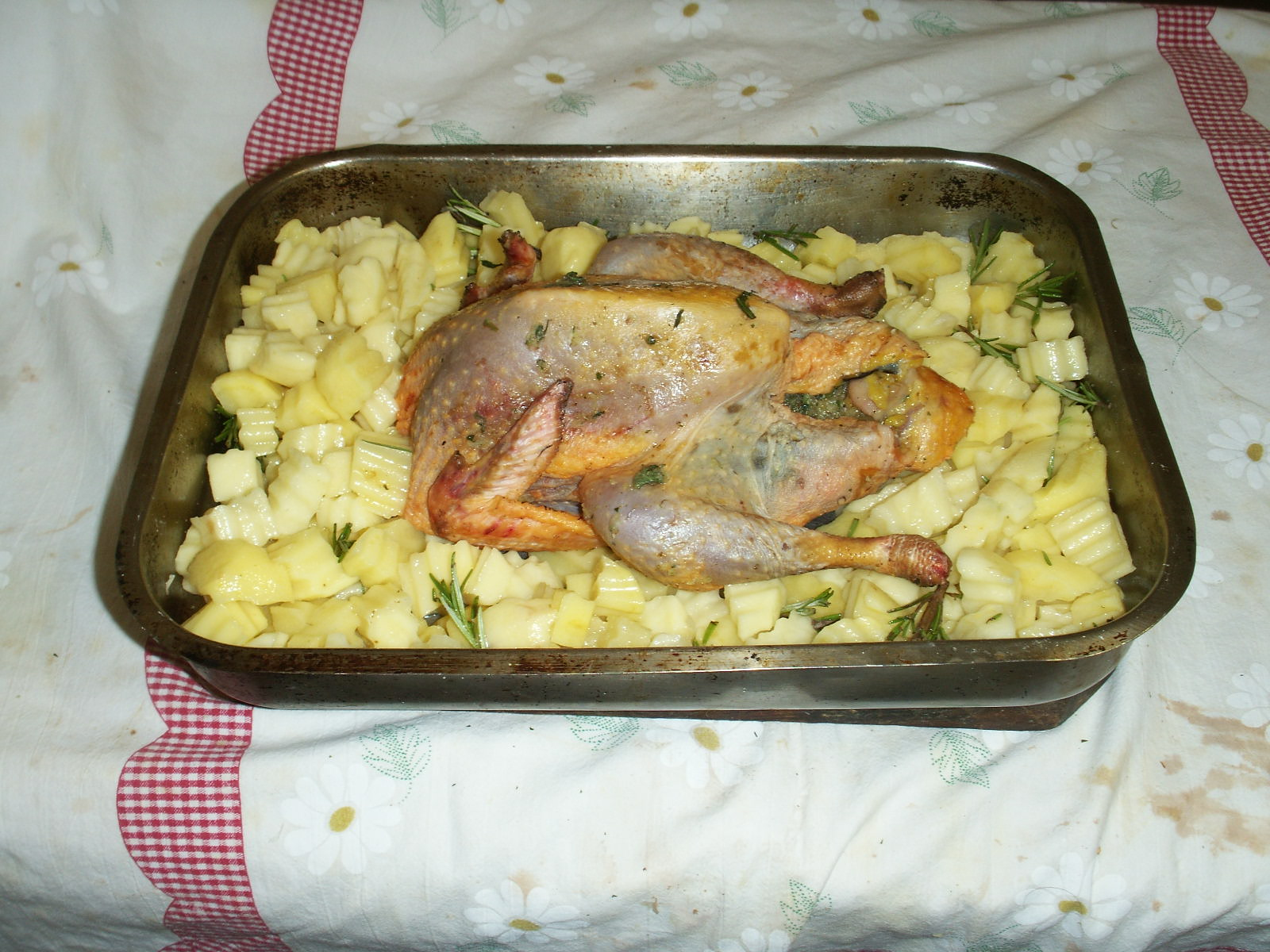 Faraona al forno con patate.pronta da infornare